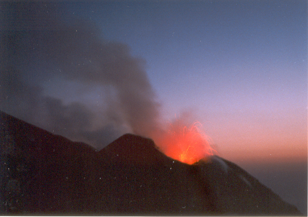 Stromboli; oskenovaná fotka 9x13.